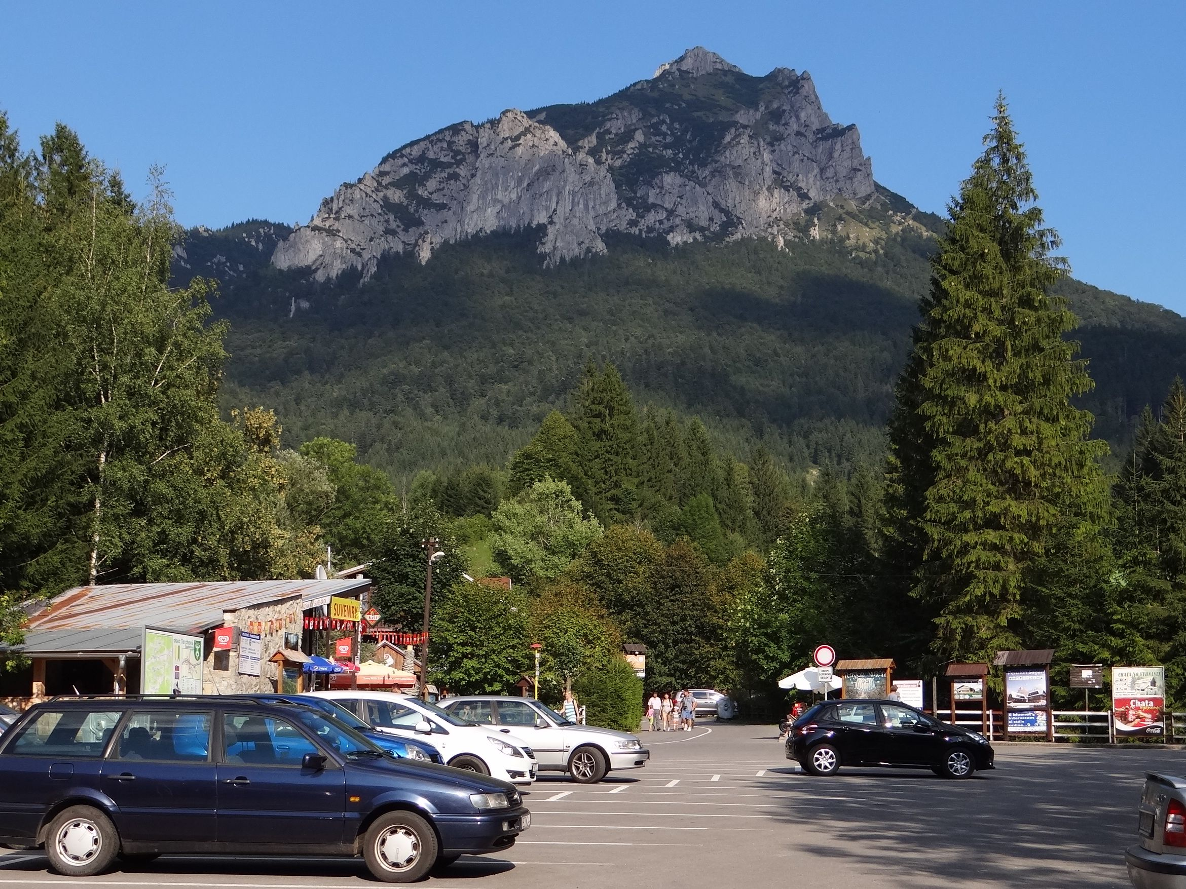 Stefanowá